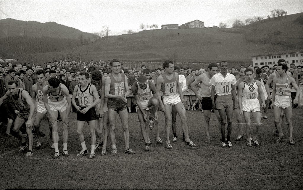 Título original: Carrera de cross internacional de Elgoibar (6/10) Localización: Elgóibar (Guipúzcoa)